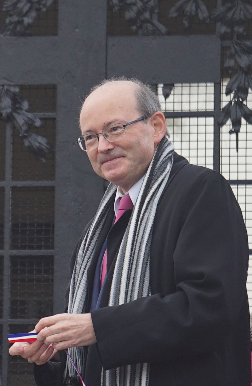 lors de l'inauguration de la refection du cimetière de Nauroy.